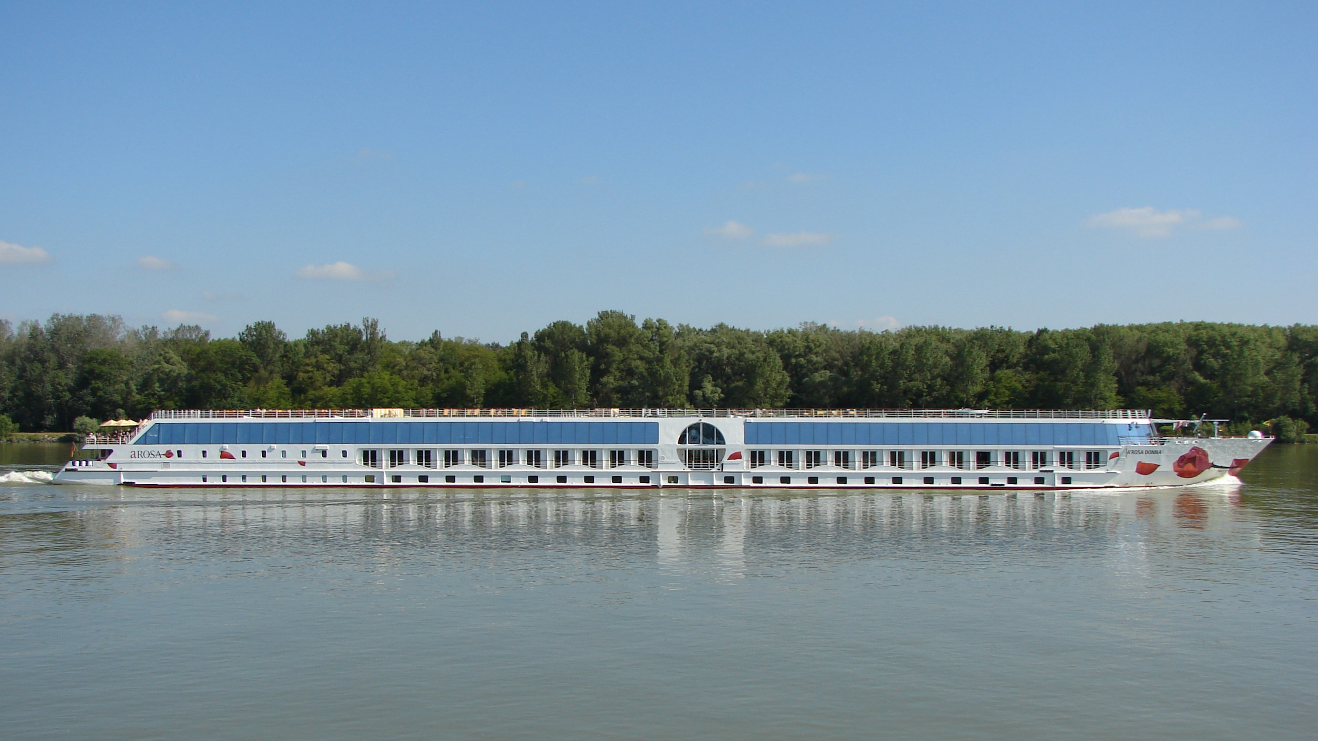 Das Passagierschiff A'Rosa Donna auf der Donau in Niederösterreich.